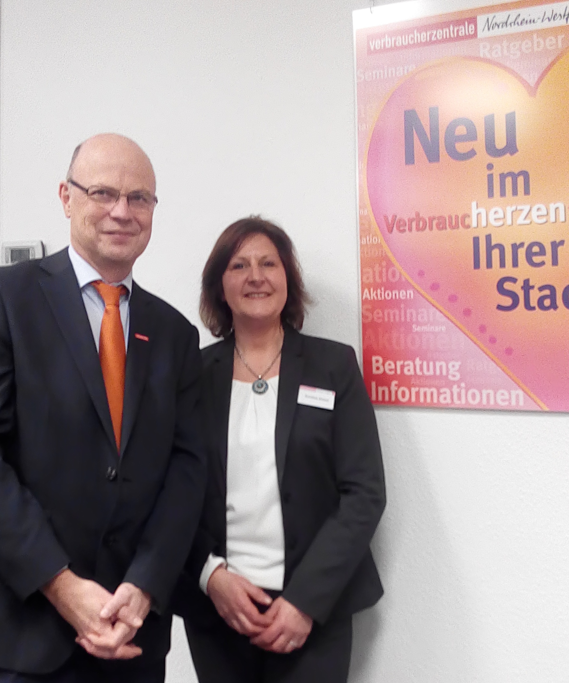 NRW-Vorstand Schuldzinski und Filialleiterin Khairat